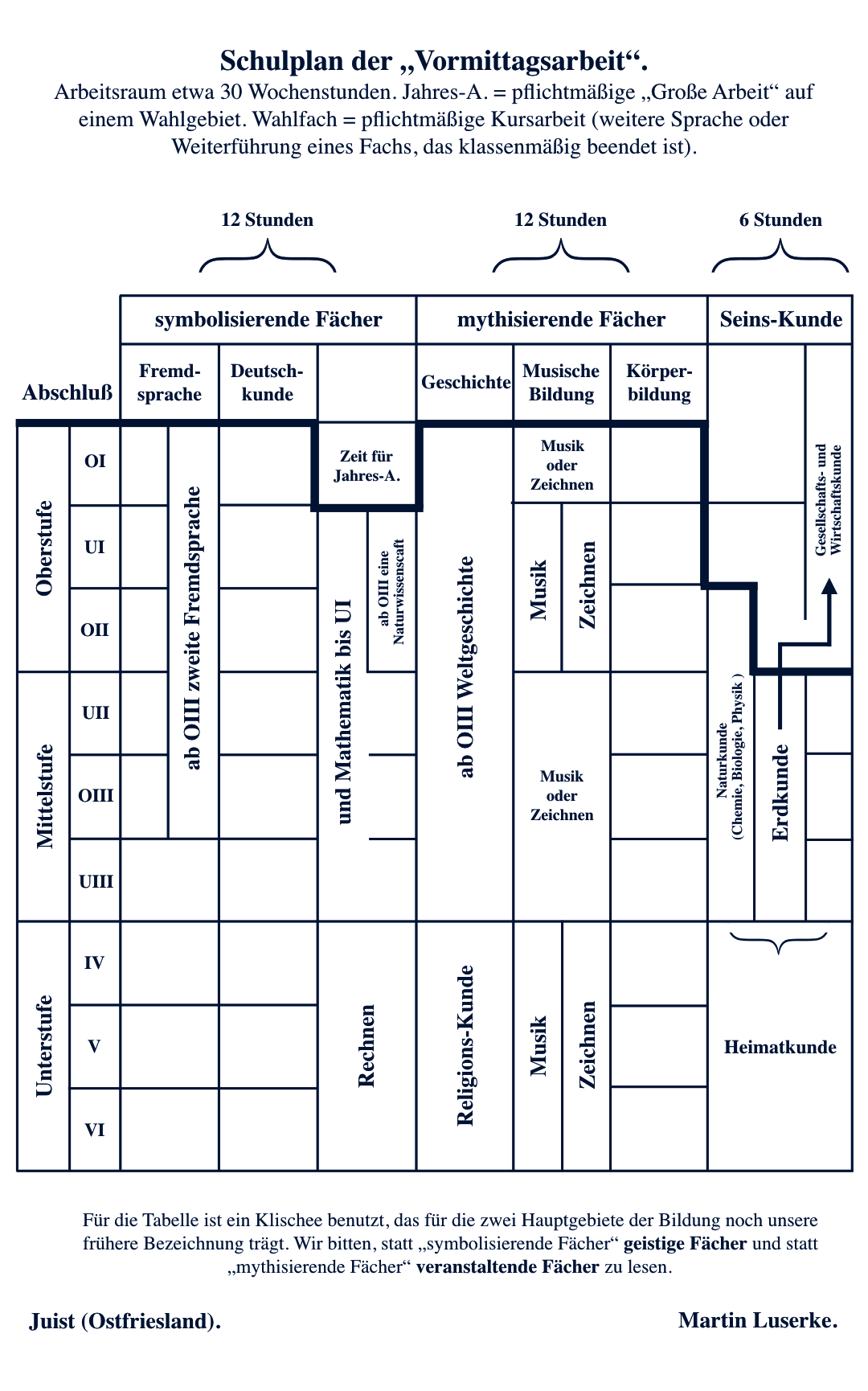 Versuchsschulplan der Vormittagsarbeit, 1931 von Martin Luserke für die Schule am Meer, Juist, beim Preußischen Staatsministerium für Wissenschaft, Kunst und Volksbildung in Berlin eingereicht. Die Schule am Meer auf der Nordseeinsel Juist war von 1925–1934 ein als Internat geführtes reformpädagogisches Gymnasium.